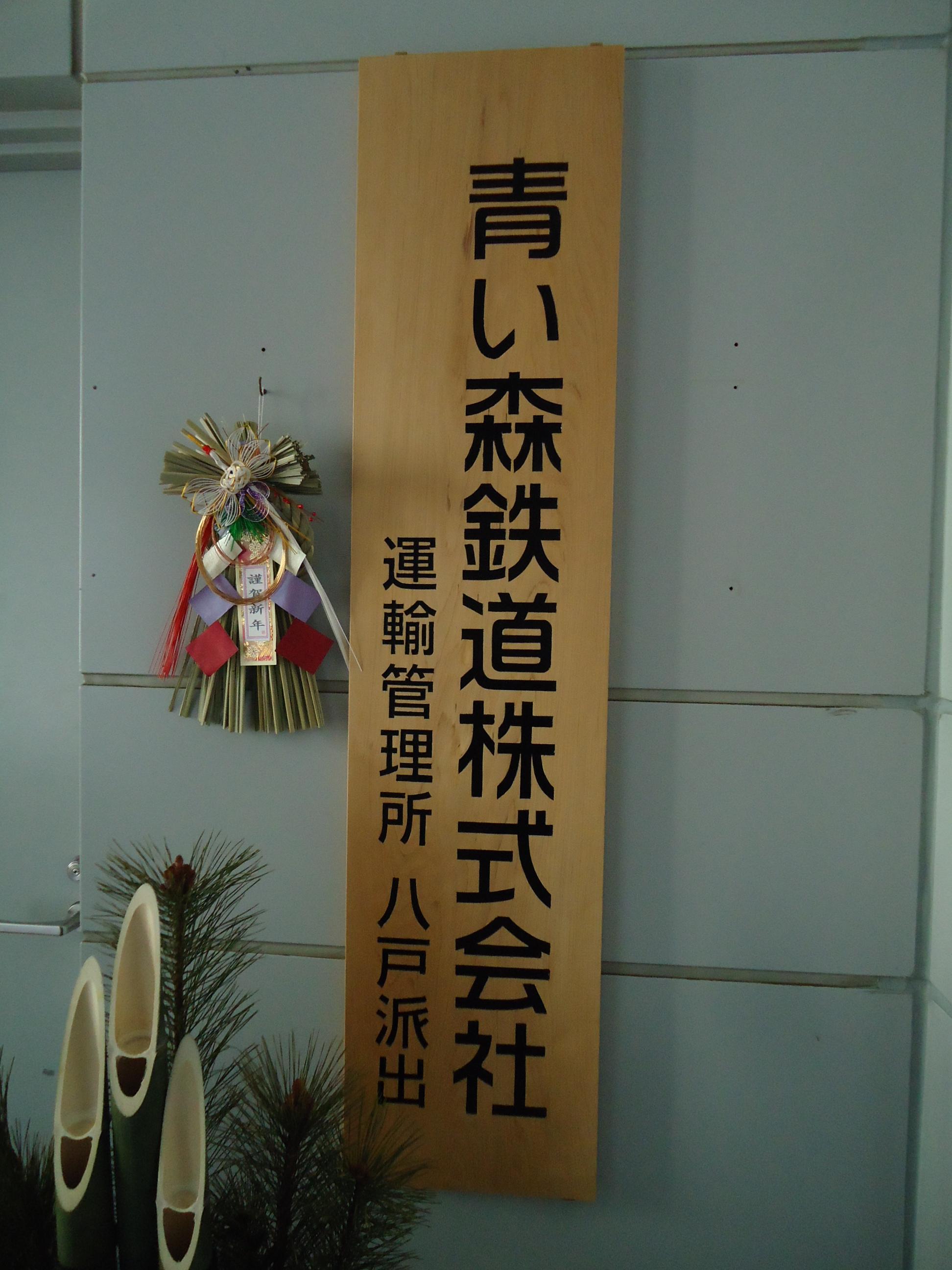 青い森鉄道運輸管理所八戸派出